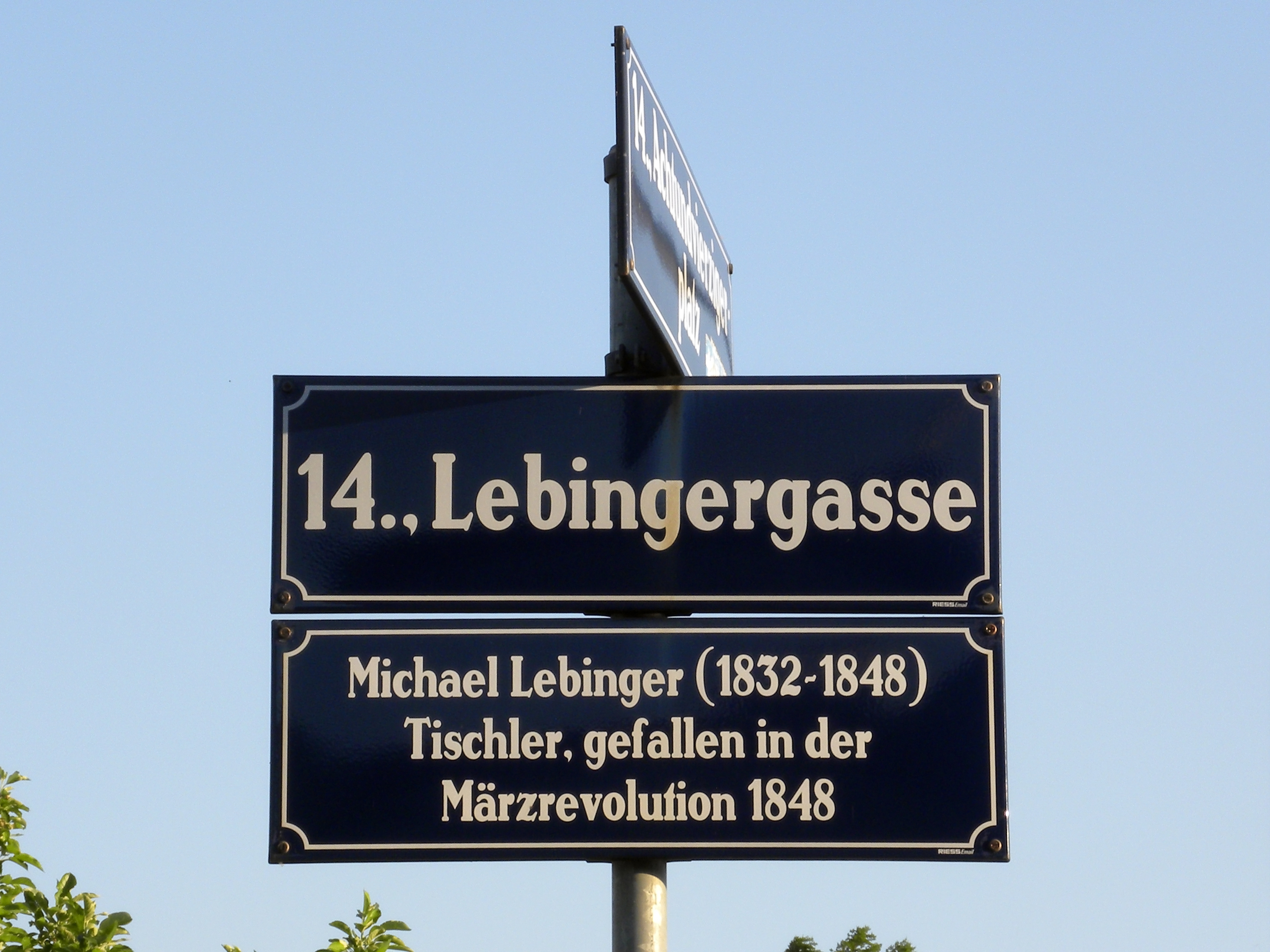 Die Straßen, Gassen und Wege rund um den an die Opfer der Märzrevolution von 1848 erinnernden Achtundvierzigerplatz in Wien Penzing, Breitensee, sind nach Gefallenen der Märzrevolution benannt.